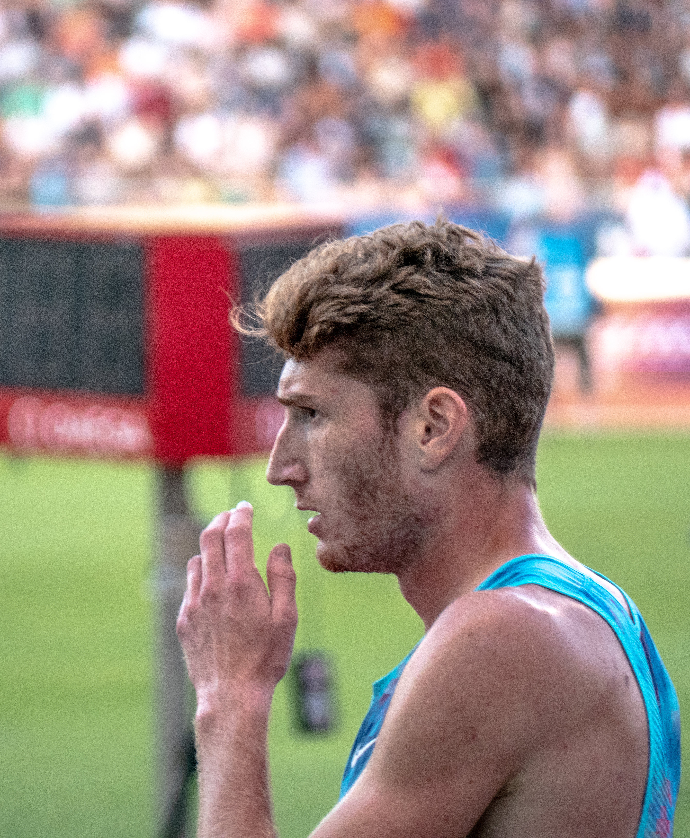 Baptiste Mischler